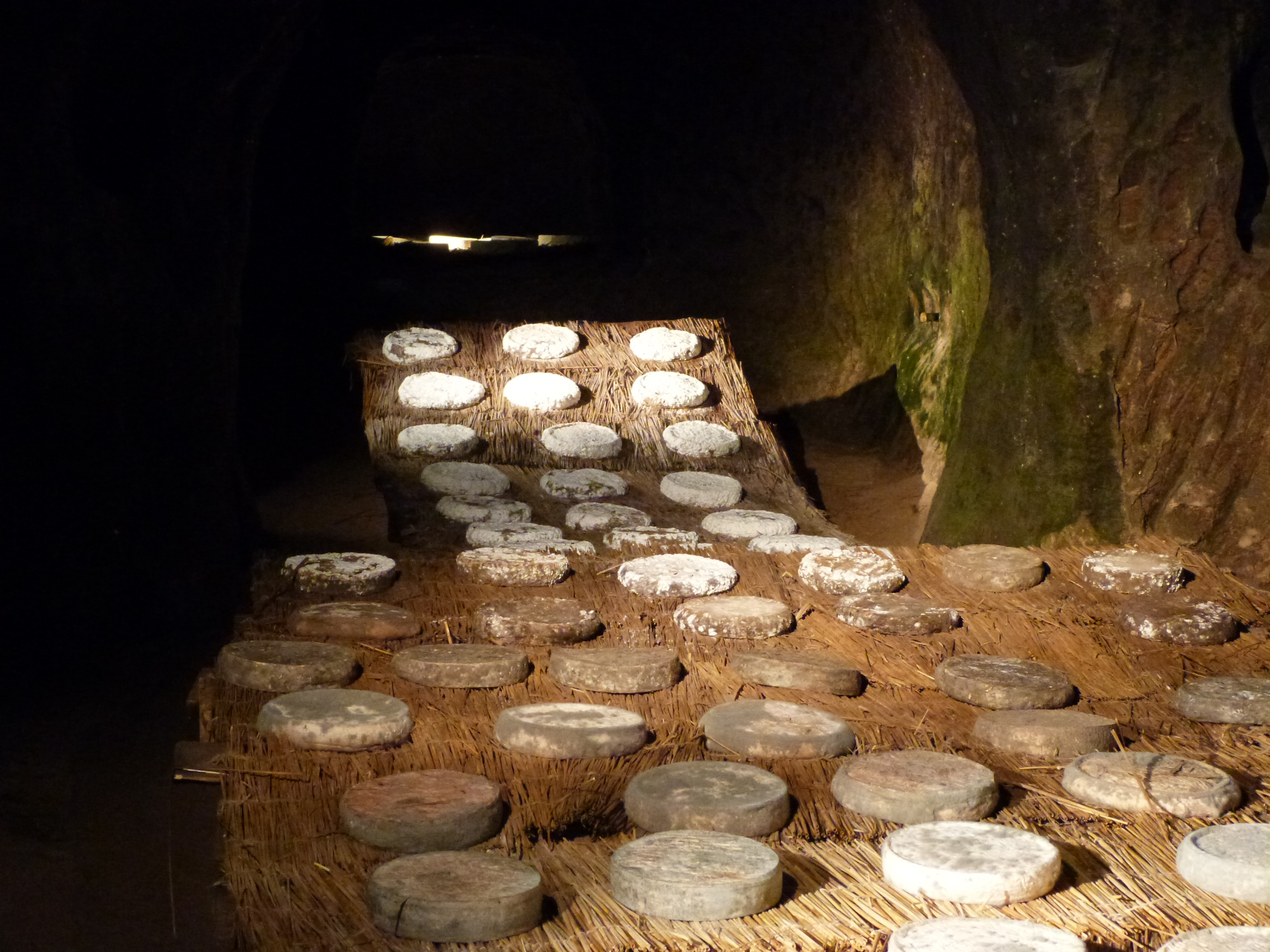 Grotte d'affinage du Saint-Nectaire de la ferme Bellonte